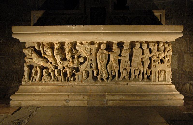 Mestre de Cabestany. Sarcòfag de sant Sadurní. Abadia de Sant Hilari, Llenguadoc-Rosselló, França